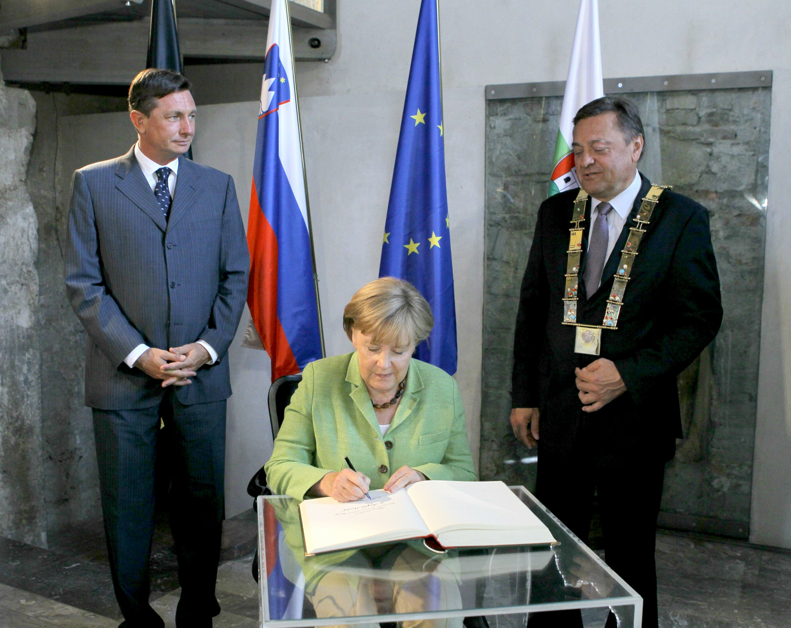 Angela Merkel in Slovenia 2011